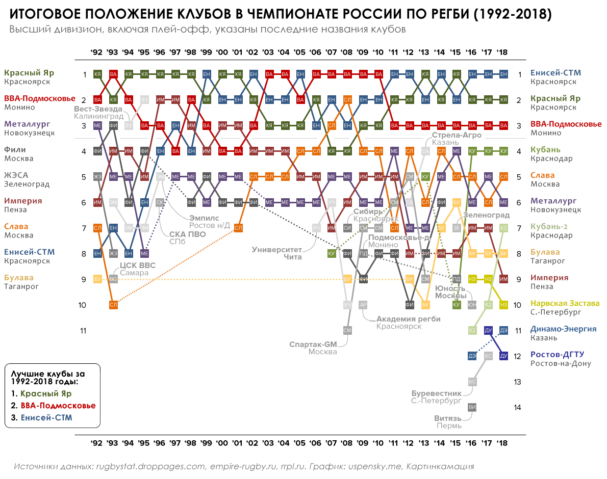 График мест клубов в турнирной таблице чемпионата России, 1992-2018 годы.